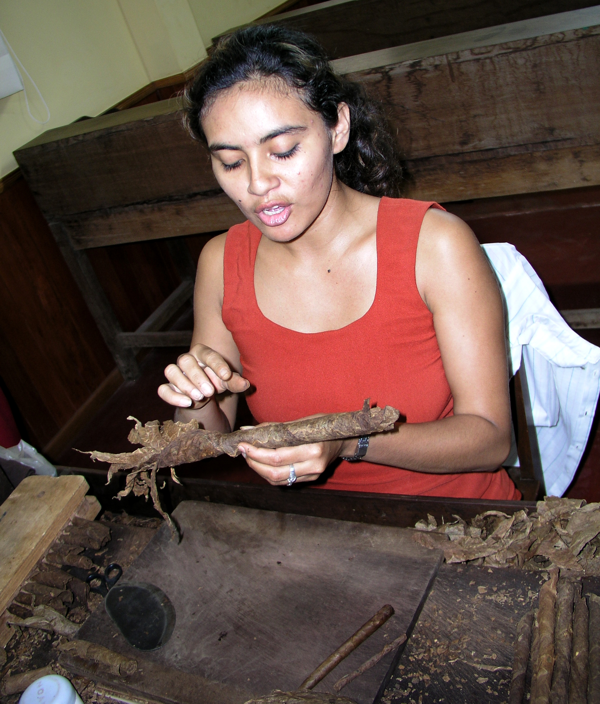 Tabacalera del Oriente, Tarapoto, San Martin, Peru.